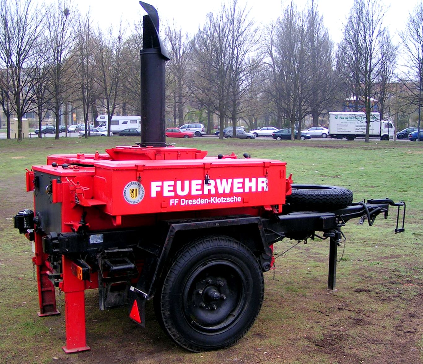 Gulaschkanone Typ: FKÜ 180/72M Baujahr: 1985 aus ehemaligem NVA-Bestand, heute Freiwillige Feuerwehr Dresden Klotzsche